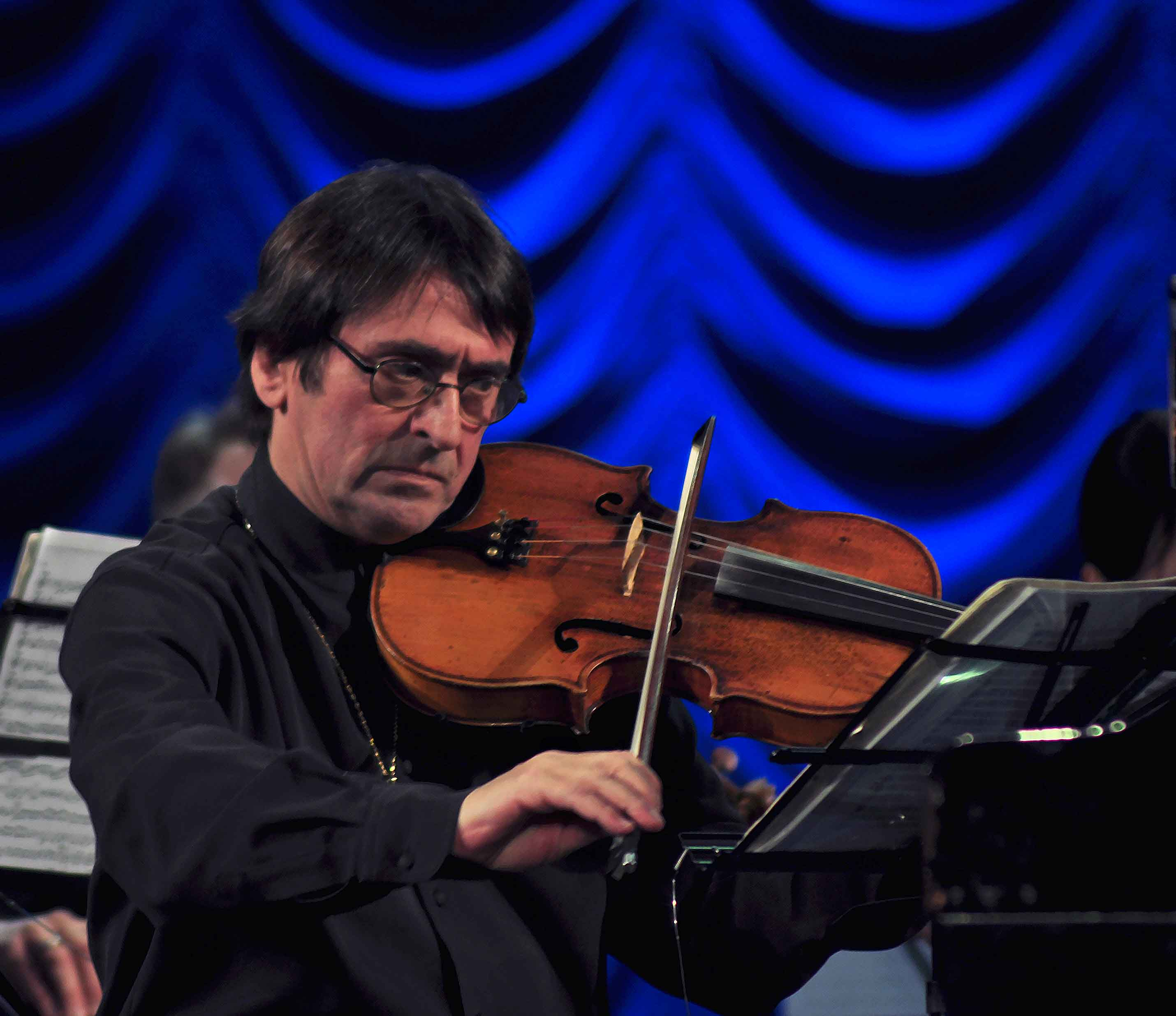 Гала – концерт открытия Зимнего фестиваля искусств 2017